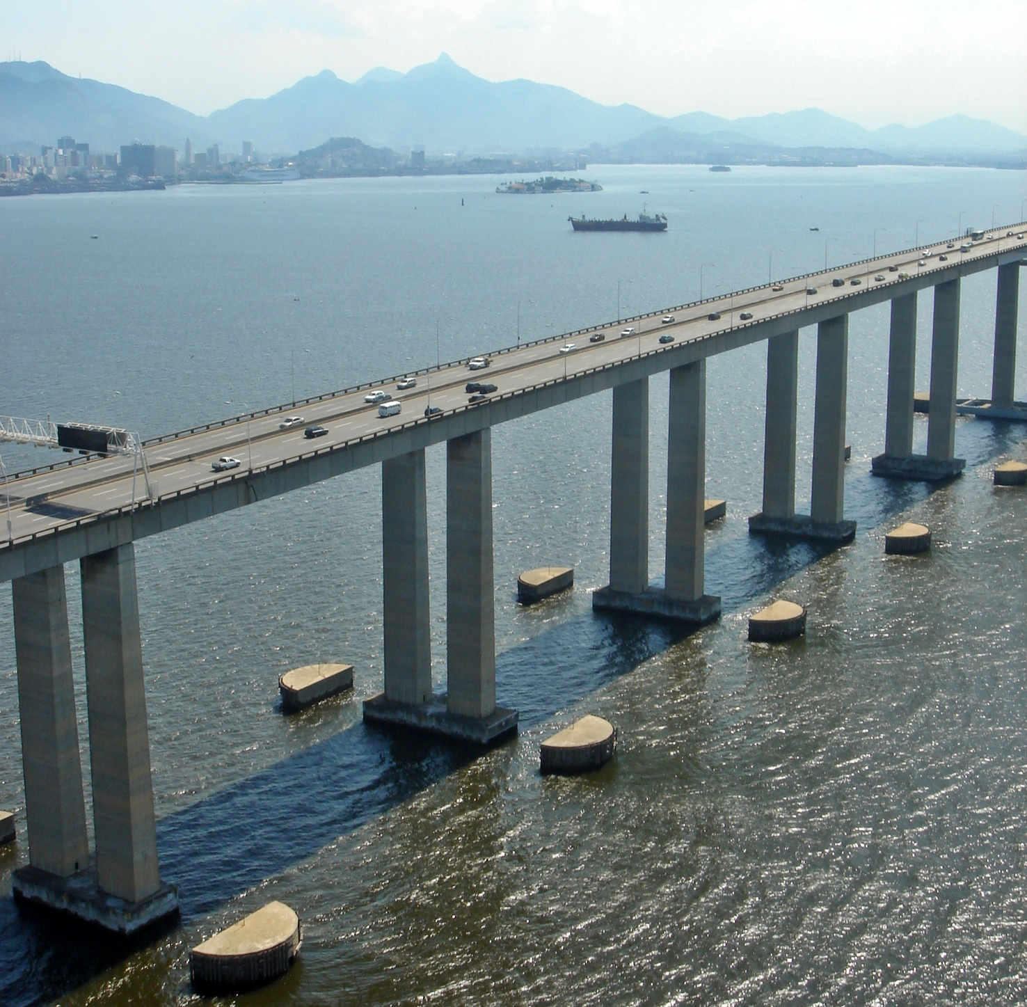 Ponte Rio-Niteroi